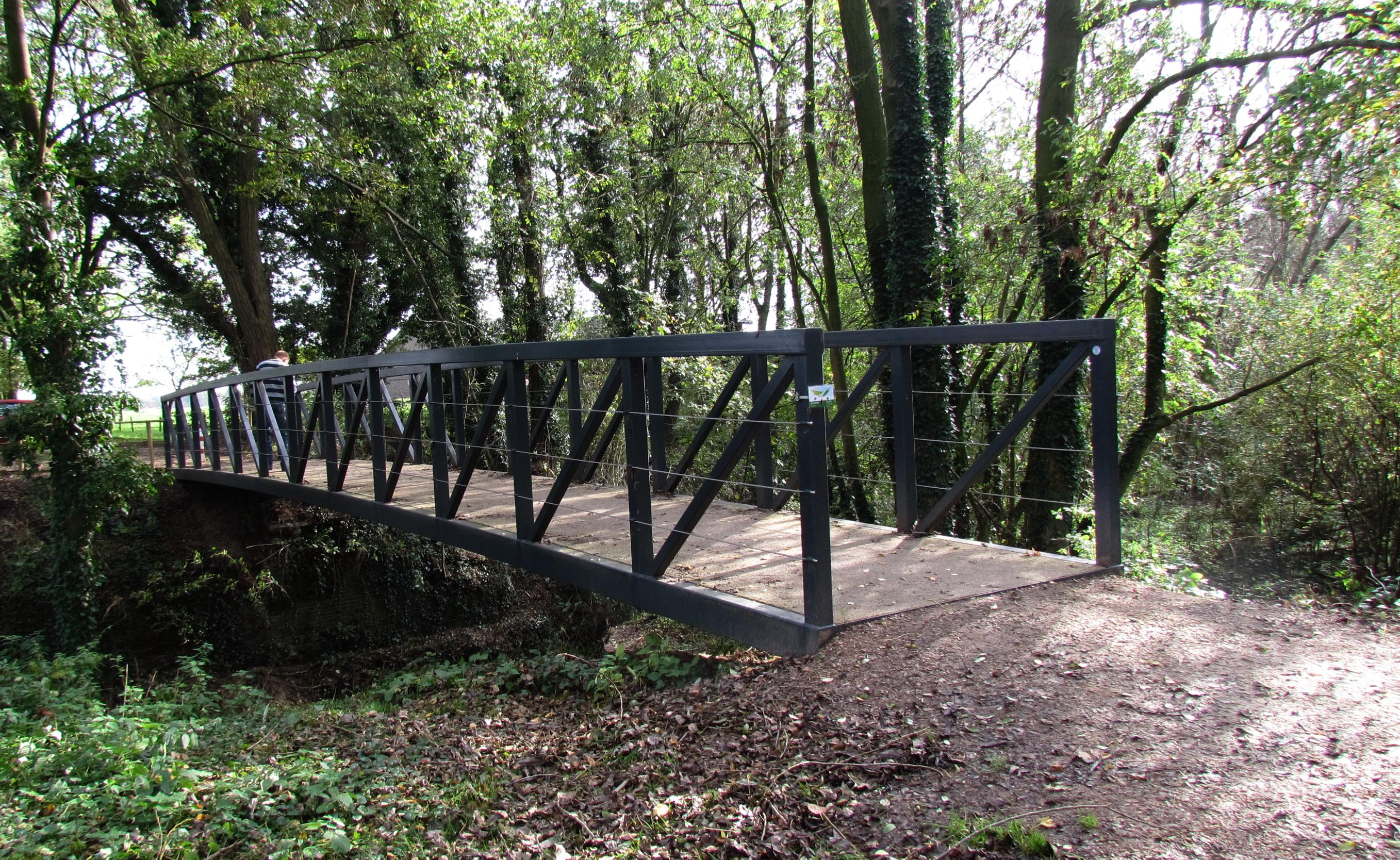 Wassermühle im Kreis Kleve